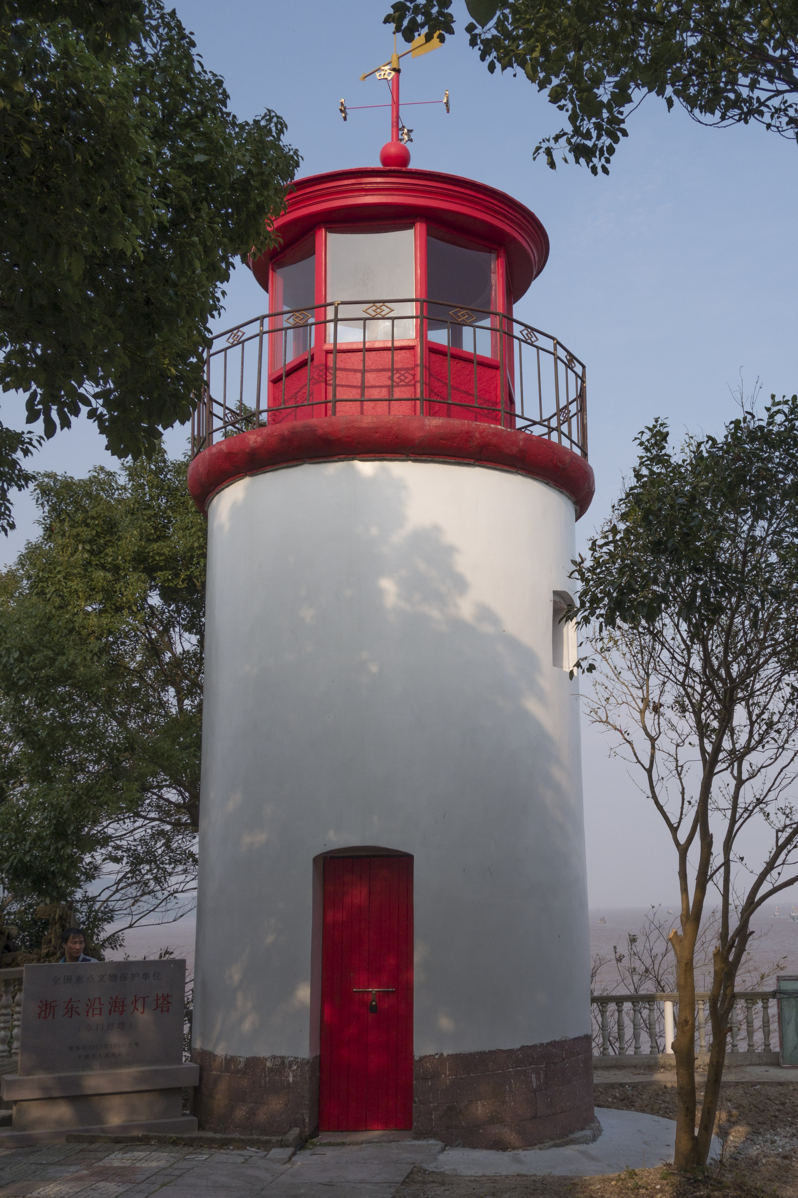 东门岛灯塔